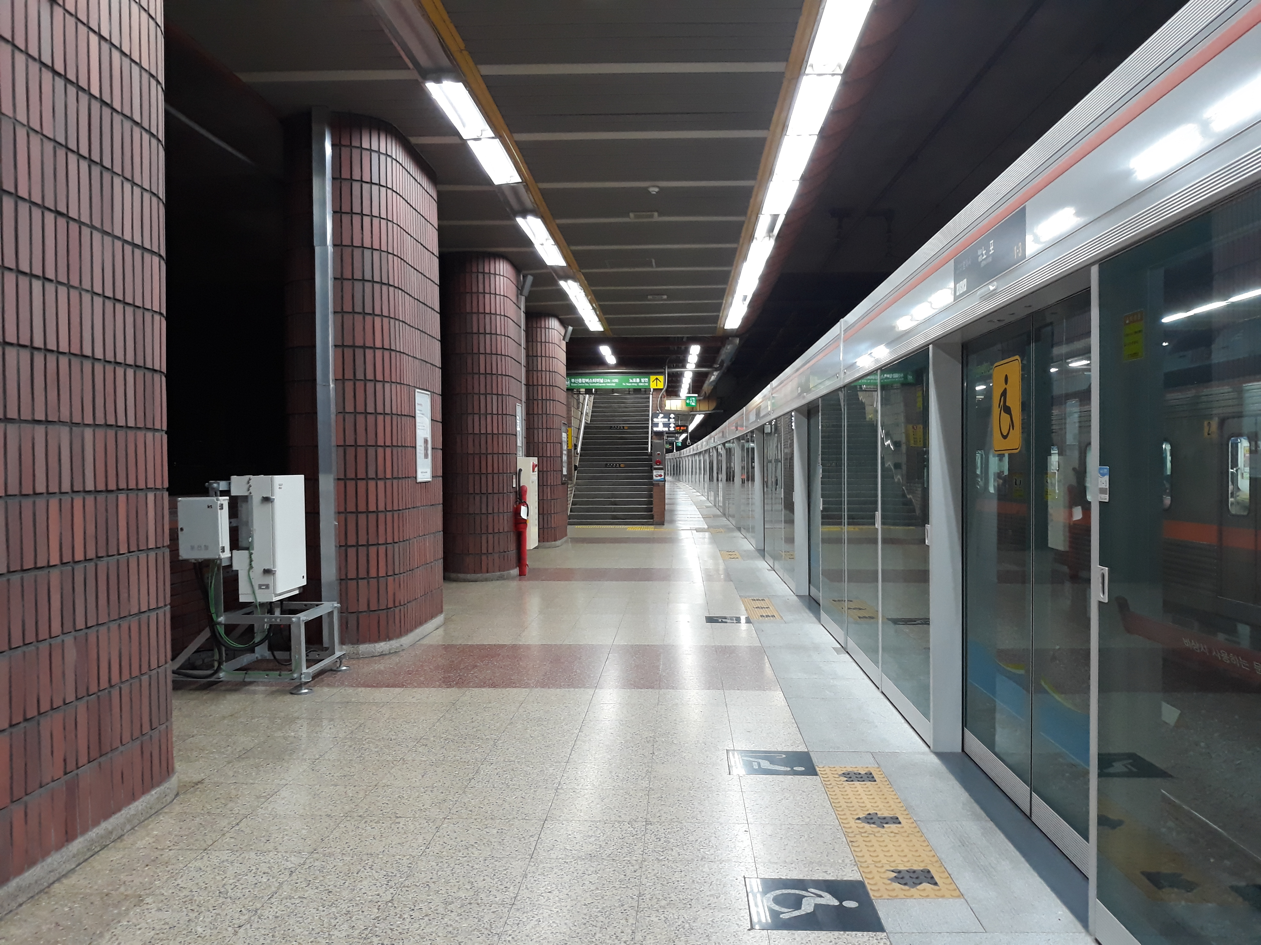 부산 도시철도 1호선 노포역 당역 종착 역명판